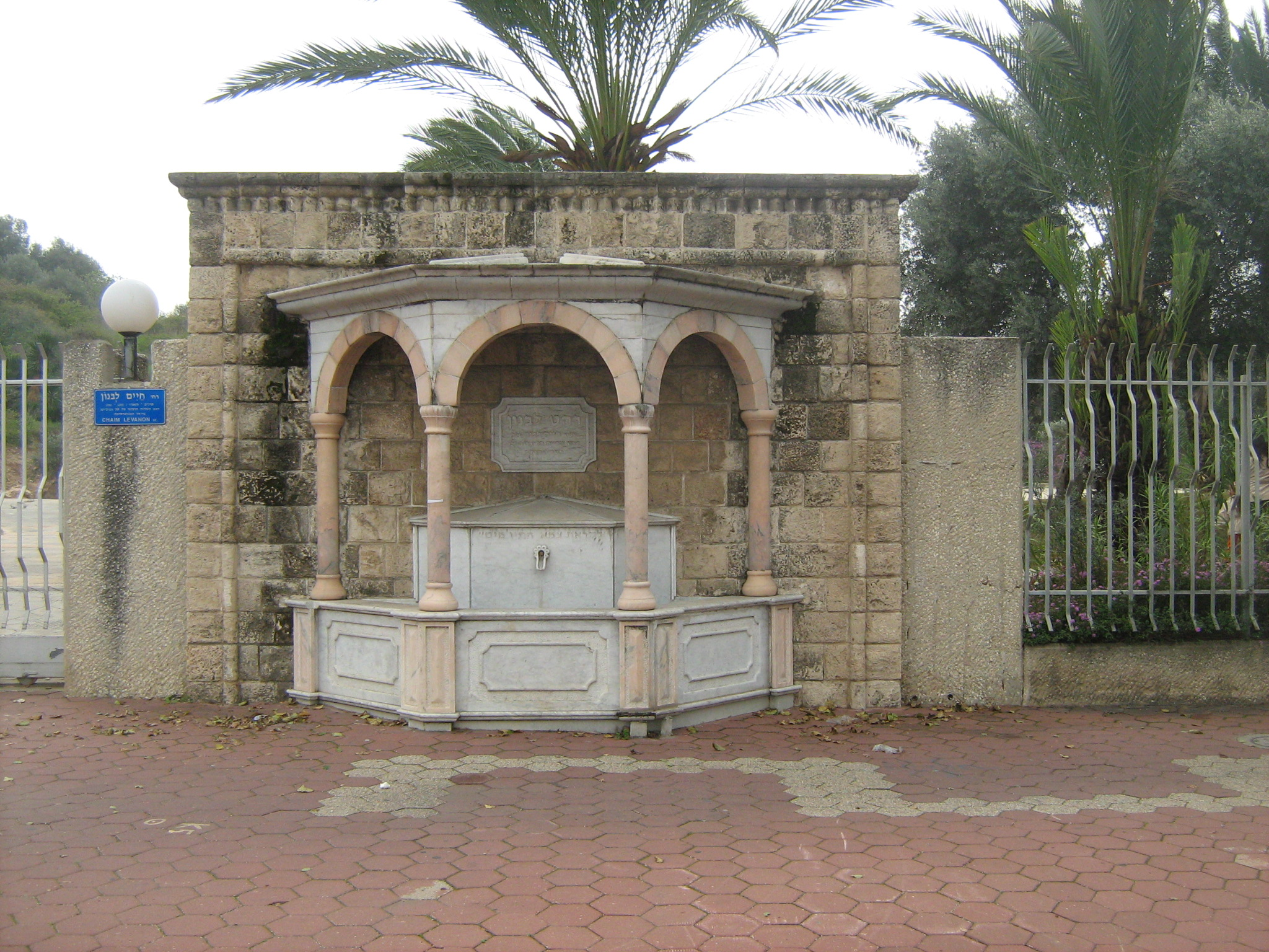 מוזיאון א"י. הסביל בכניסה